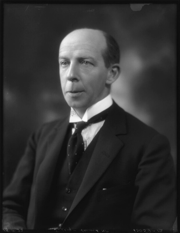 John Sturrock